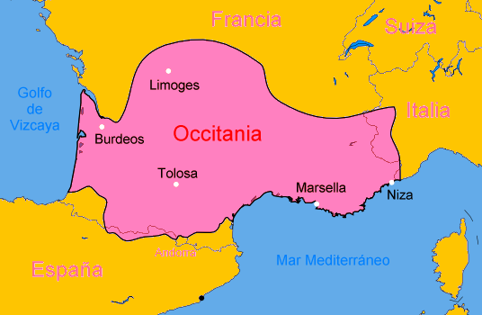 Mapa de Occitania. Tomado de la wikipedia en occitano y editado por Ecemaml 00:12 4 feb, 2005 (CET)